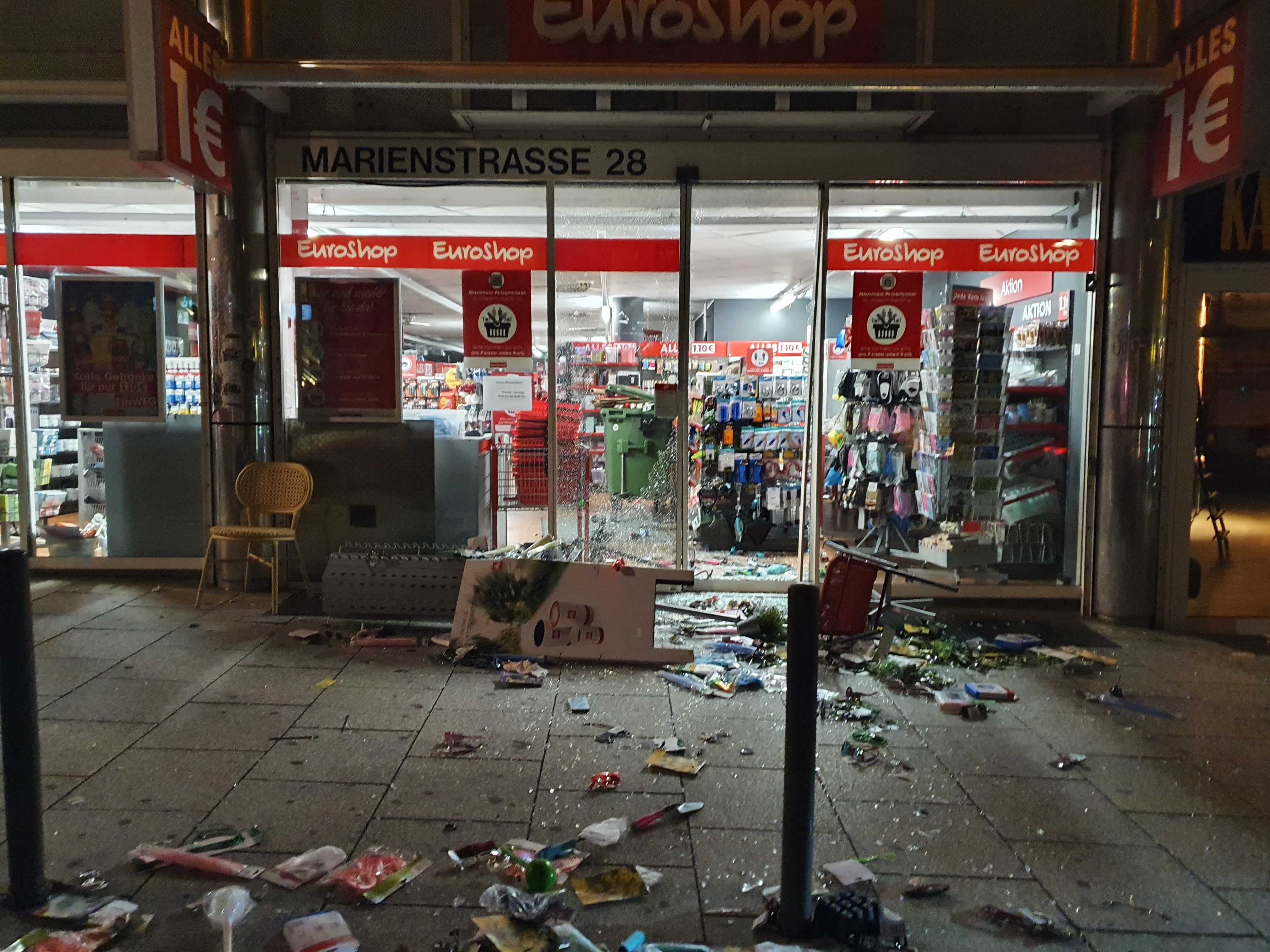 Euroshop in der Stuttgarter Marienstraße am 21.06.2020